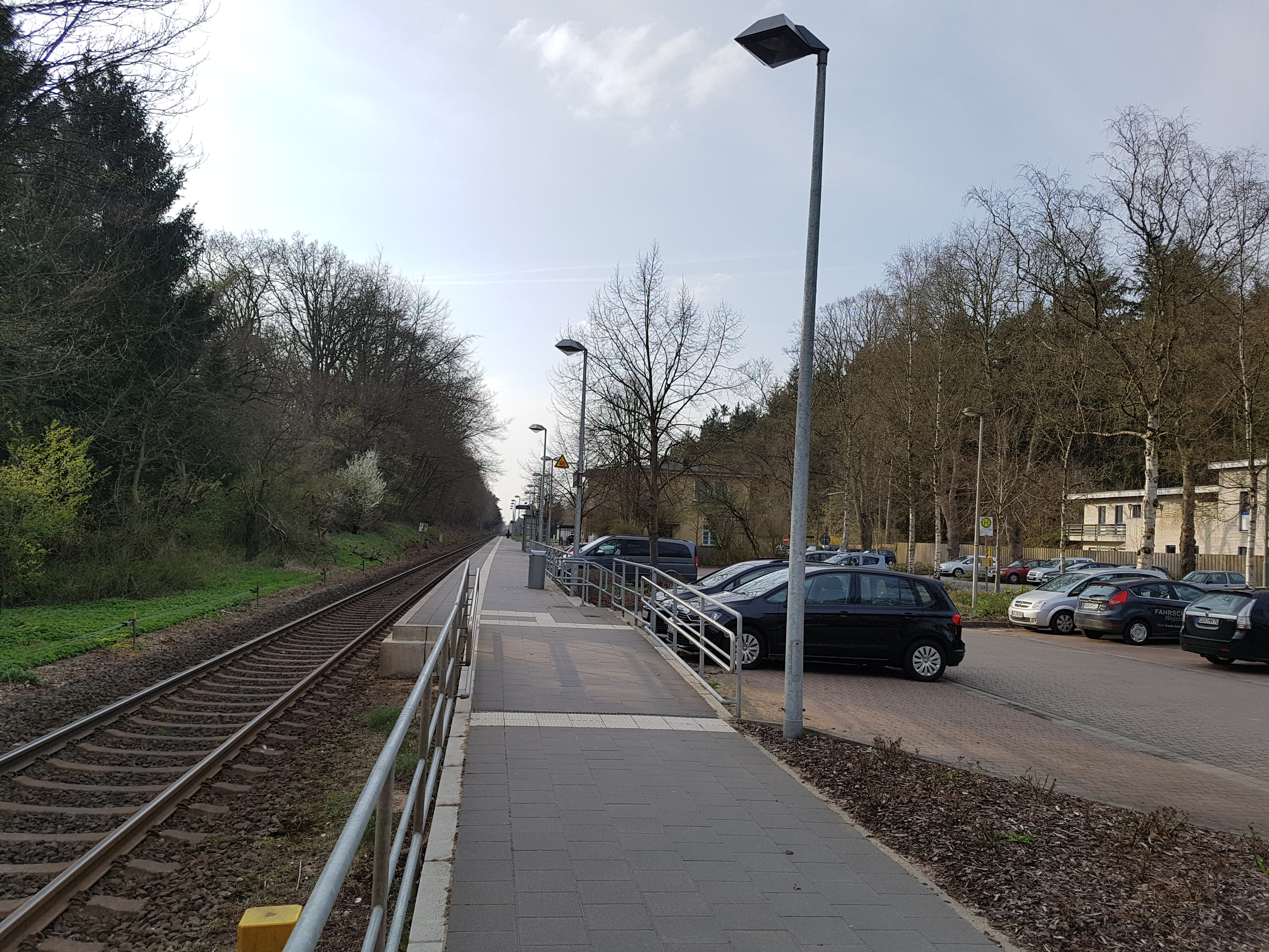 Bahnhoff in Heckthusen